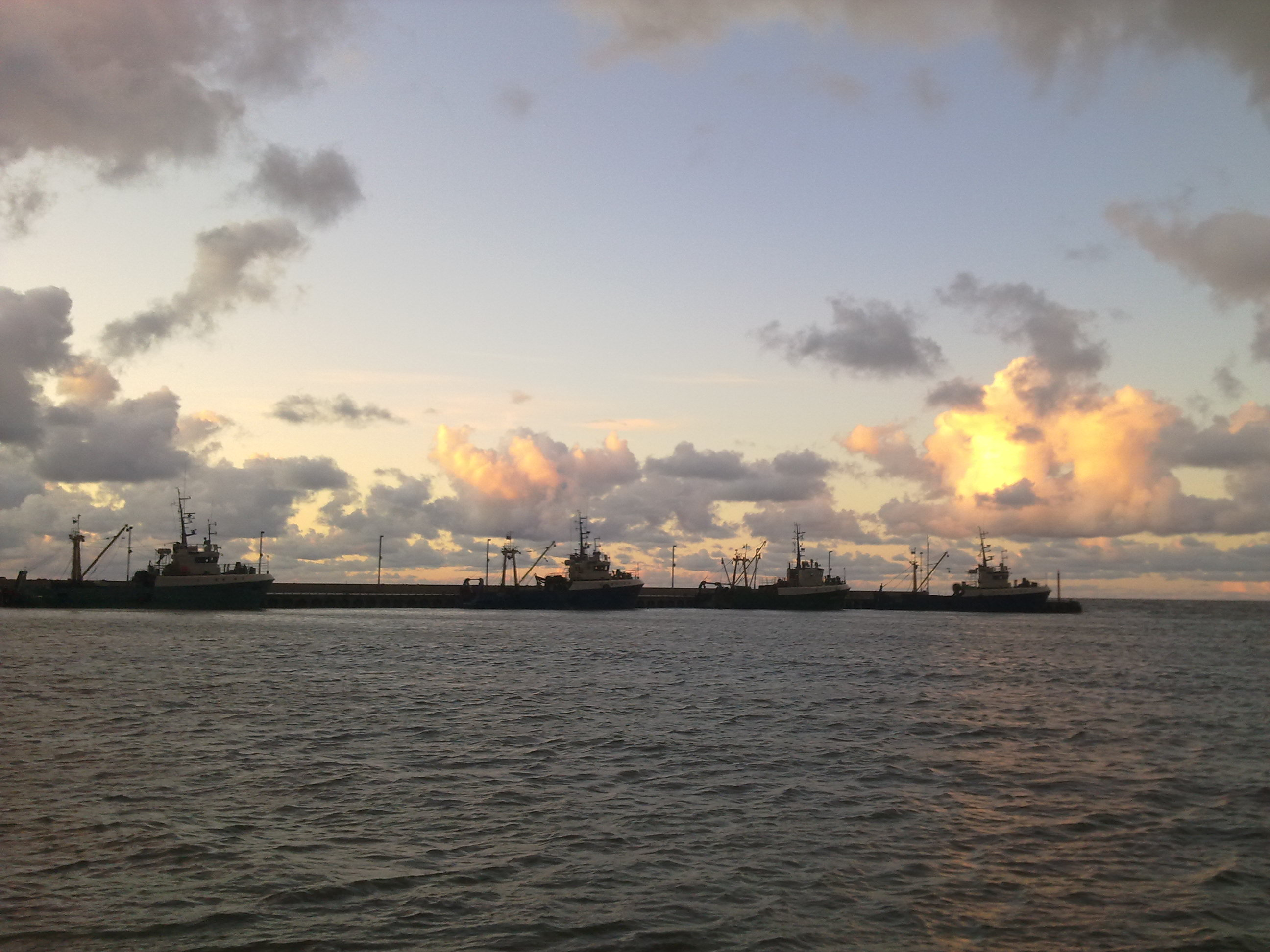 Õhtune vaade Dirhami sadamale